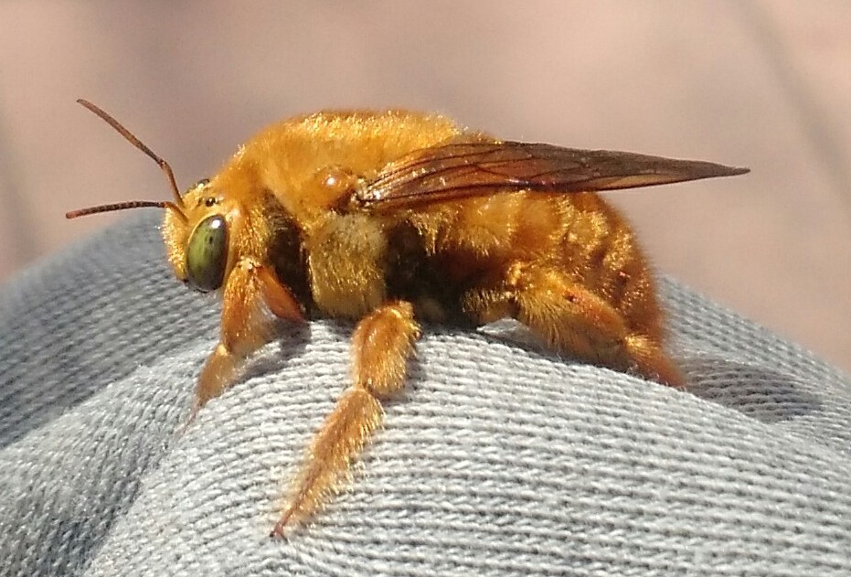 X. augusti capturada en La Pintana